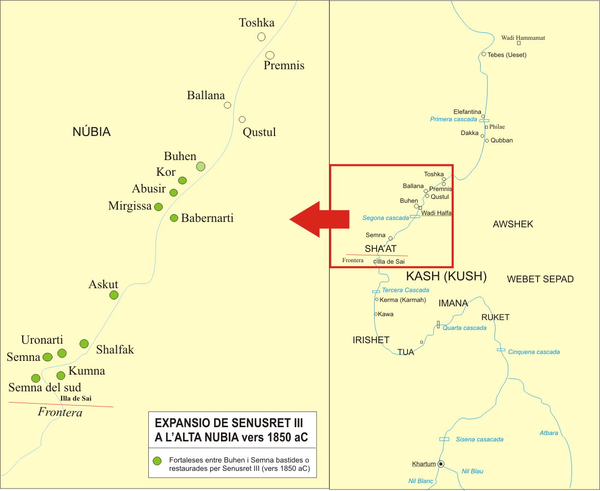 Conquestes de Senusret III a Núbia vers 1850 aC